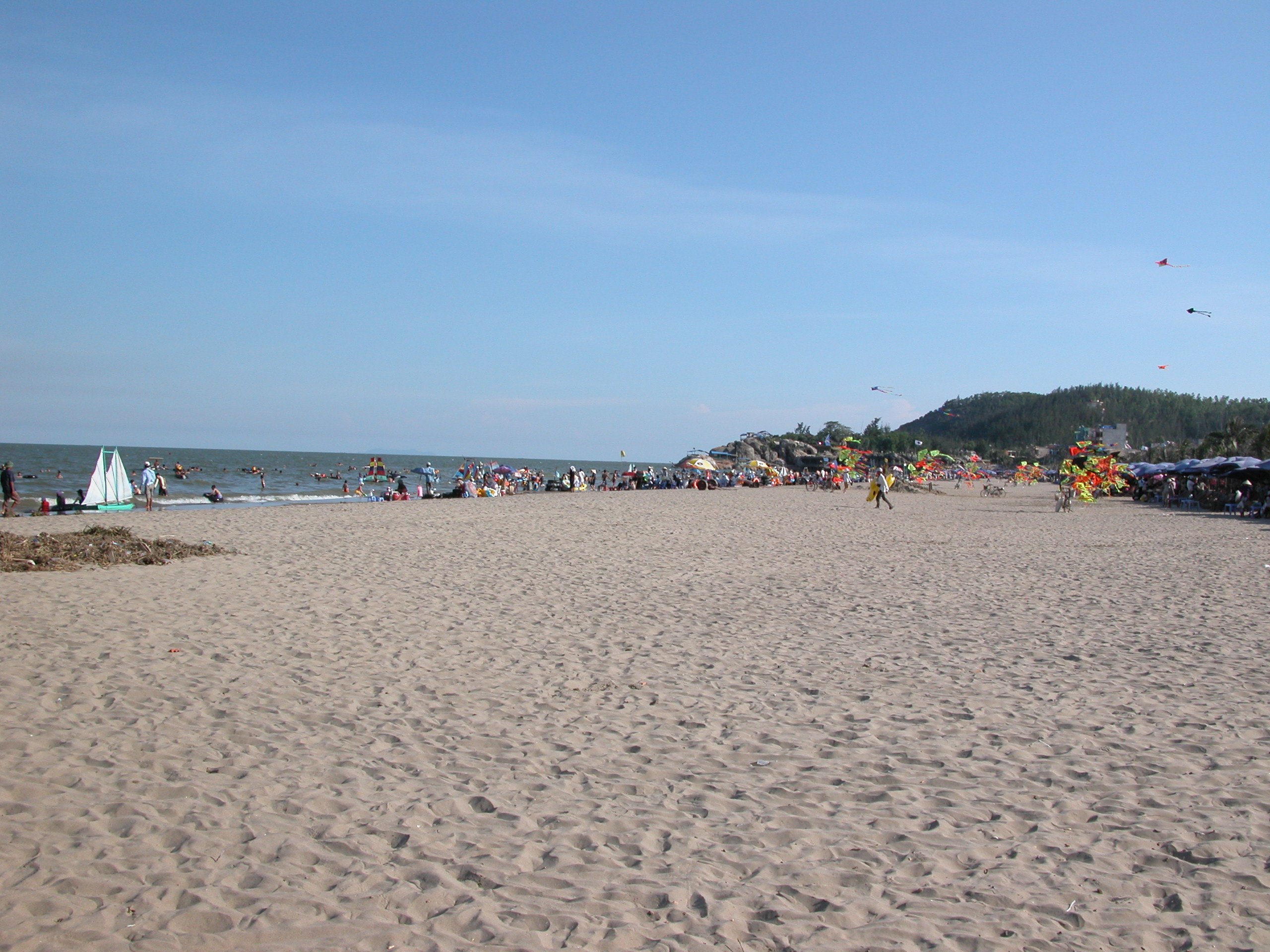 Sầm Sơn beach, Thanh Hóa province, Vietnam.